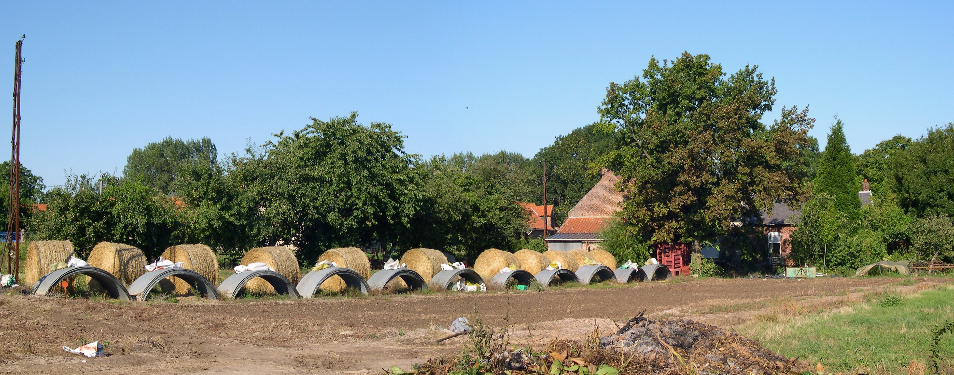 Couches destinées à la culture d'endives de pleine terre. Le 30 août 2007 à 10h22, dans la région du Cambrésis (nord de la France).